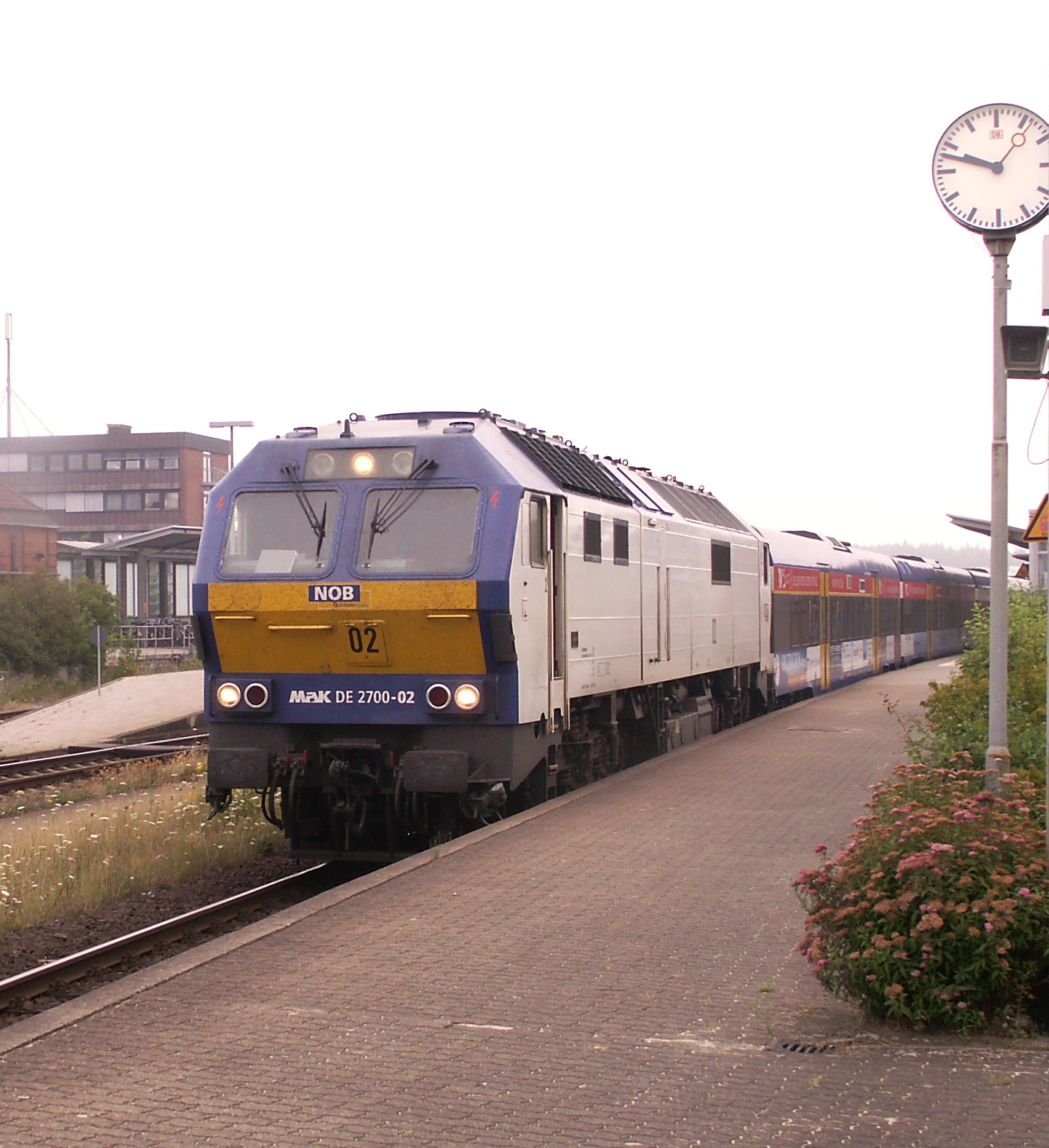 Nord-Ostsee-Bahn (NOB) DE 2700-02 im Bahnhof Husum